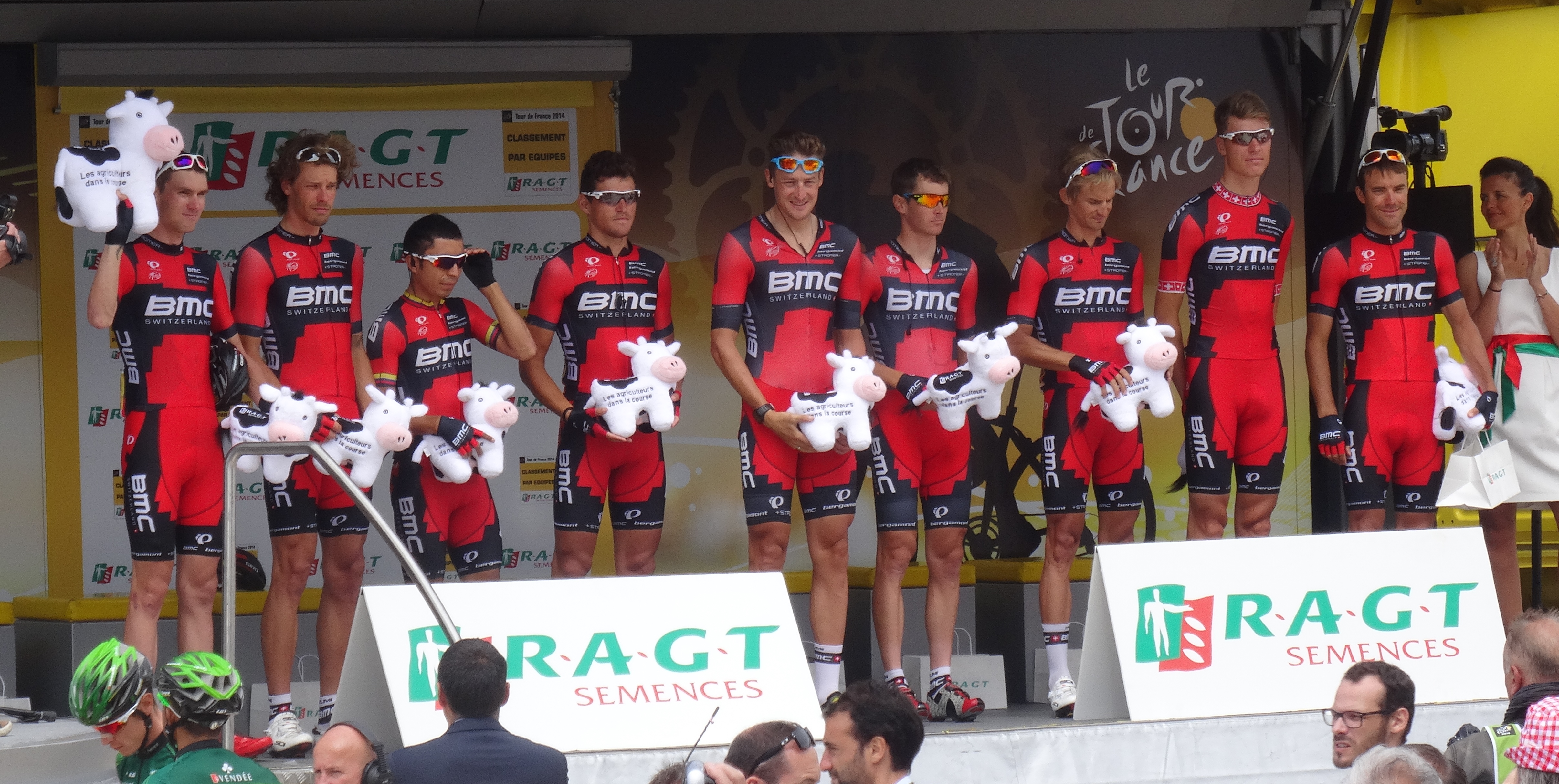 Reportage photographique réalisé le mardi 8 juillet à l'occasion du départ de la quatrième étape du Tour de France 2014 au Touquet-Paris-Plage, Nord-Pas-de-Calais, France.